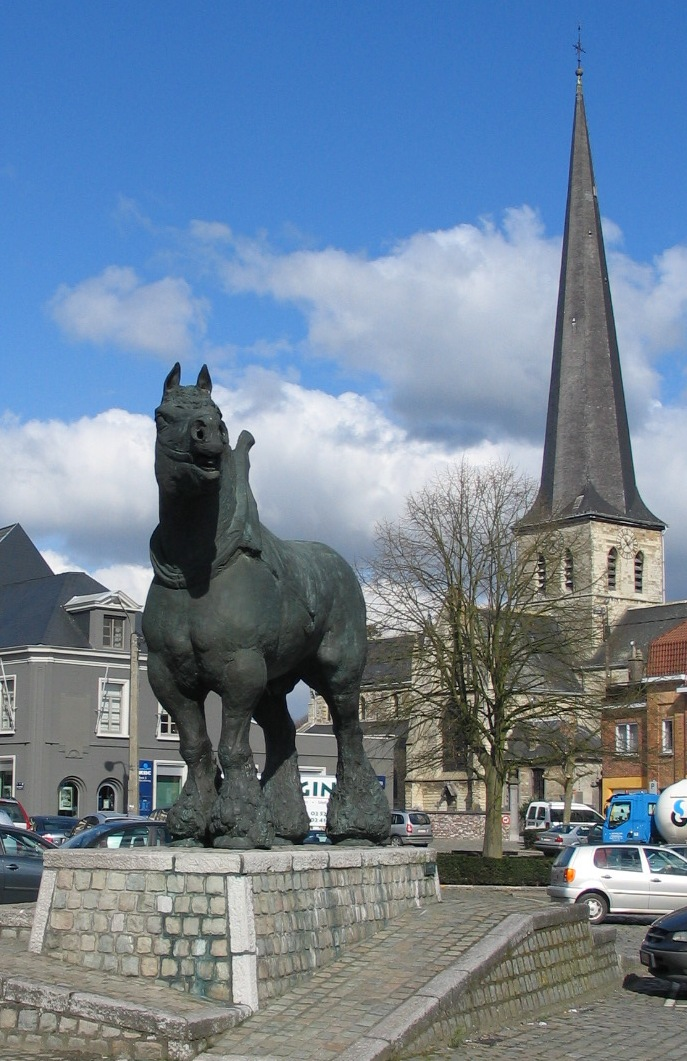 Prins, een Brabants trekpaard (Koenraad Tinel) te St Kwintens Lennik 5-04-2006 10-08-54